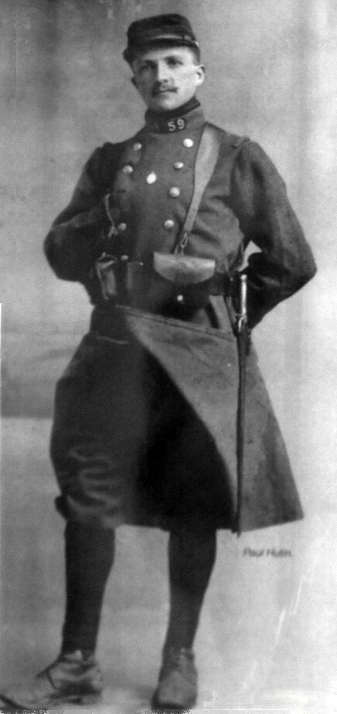 Présenté au Musée Émile Driant.